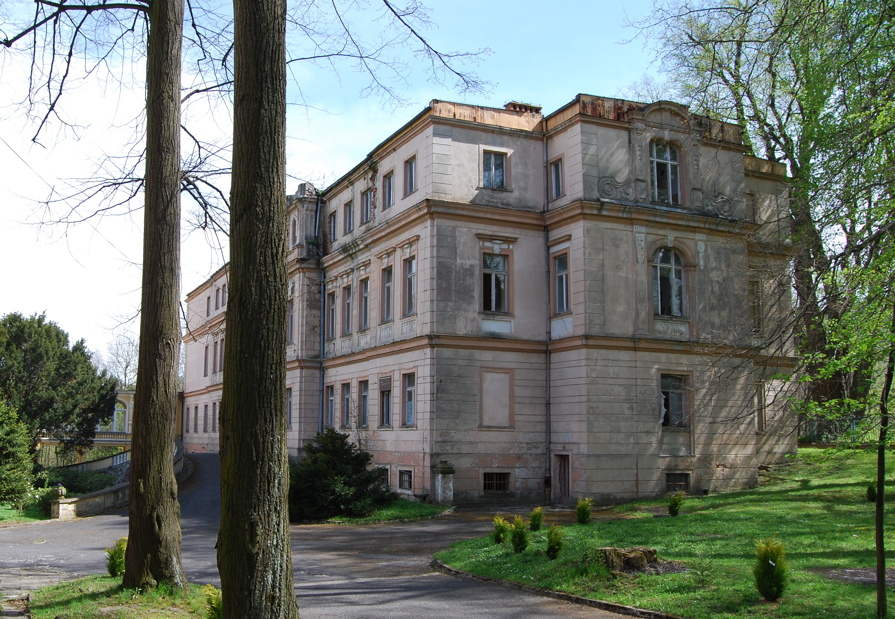 Podgórki - pałac, XIX w. (zabytek nr 557 z 17.03.1959)